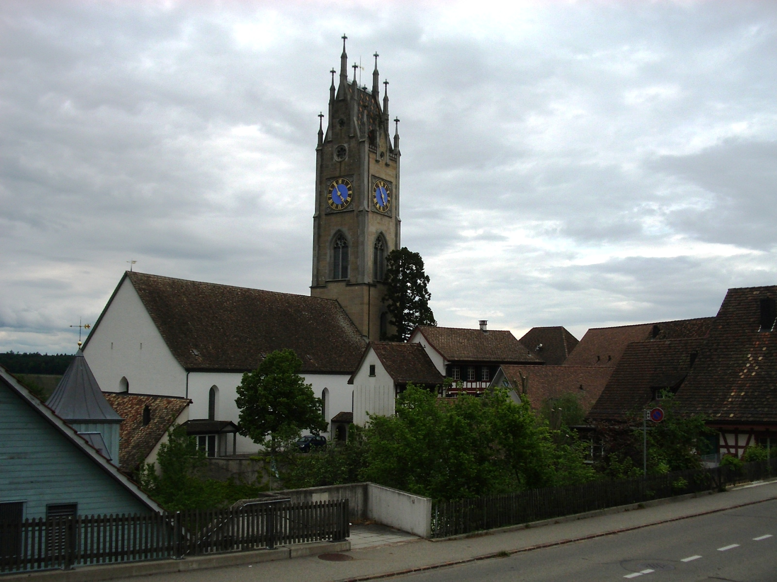 Andelfingen ZH, Switzerland